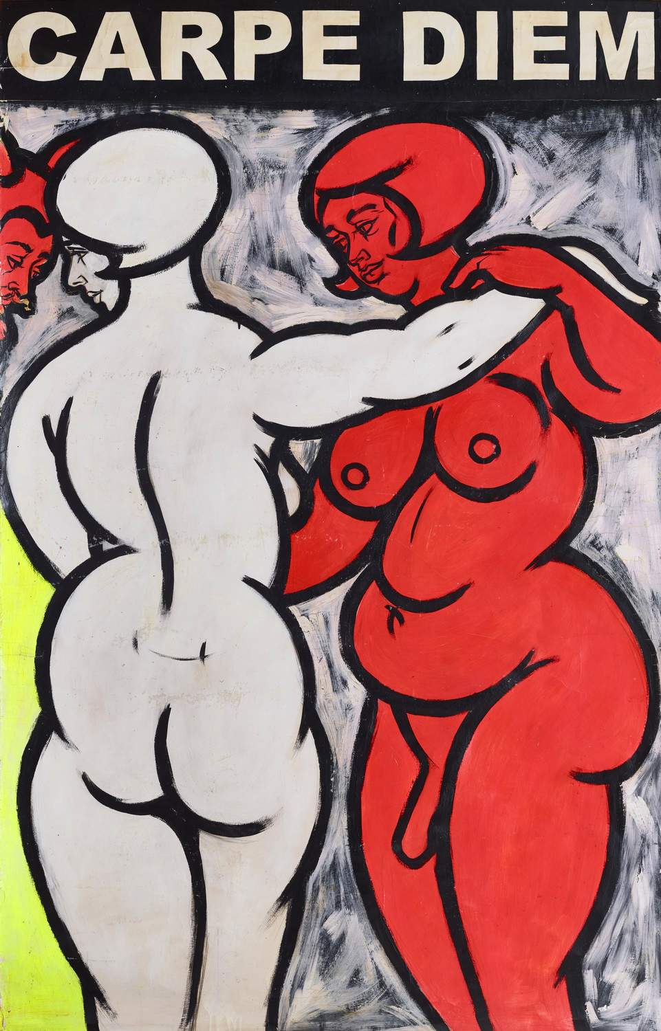 Carpe Diem, 150×270 cm, akryl na kartonu, 2002